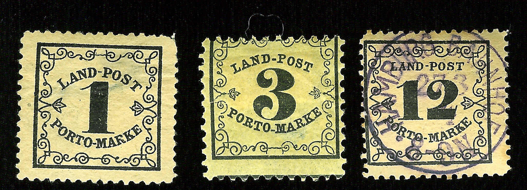 Erstellt von Martin Dürrschnabel Landpost Portomarken, ein Sondergebiet der Badener Postgeschichte aus dem Jahre 1862.